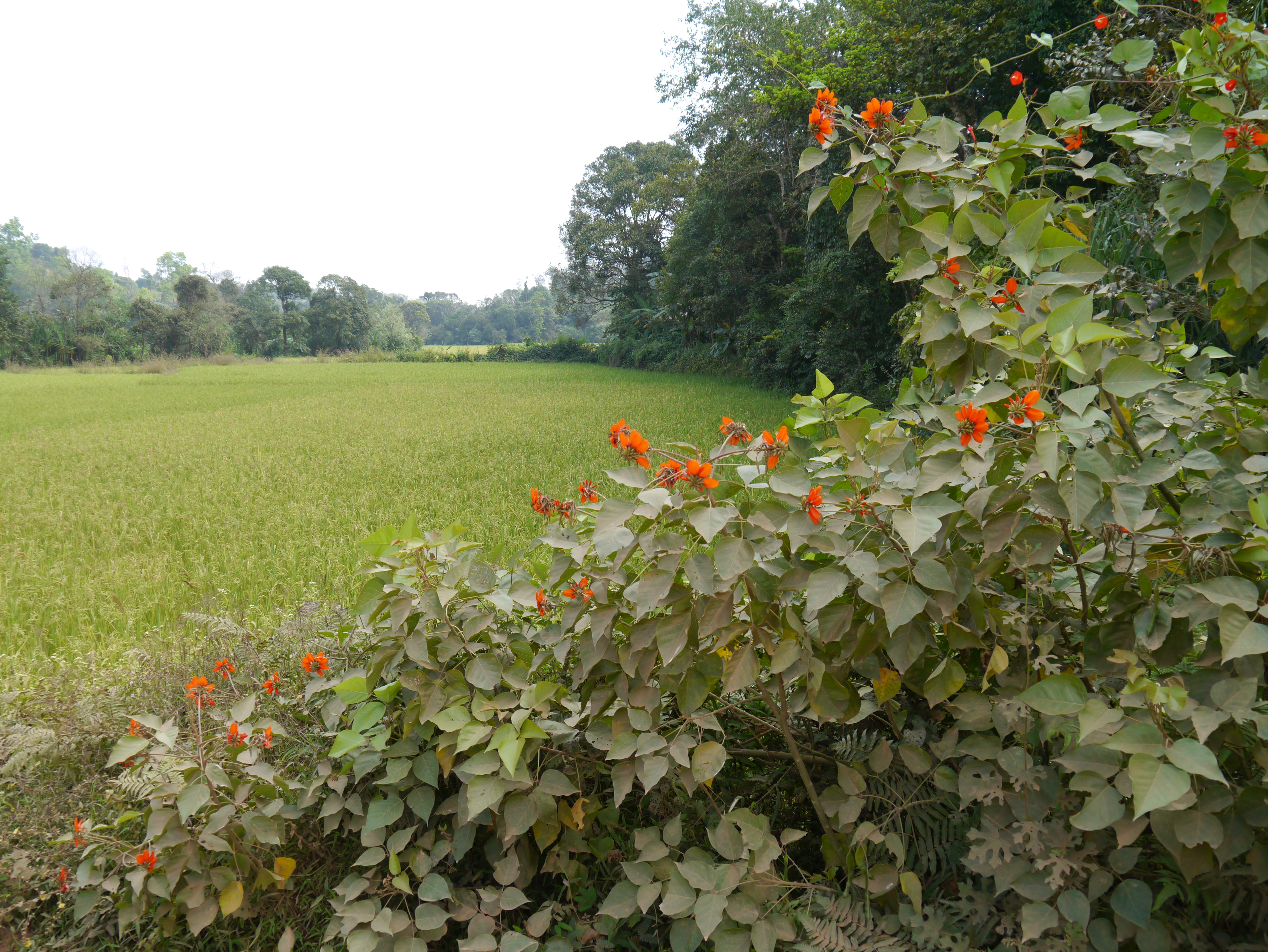 Erythrina subumbrans (Hassk.) Merr.